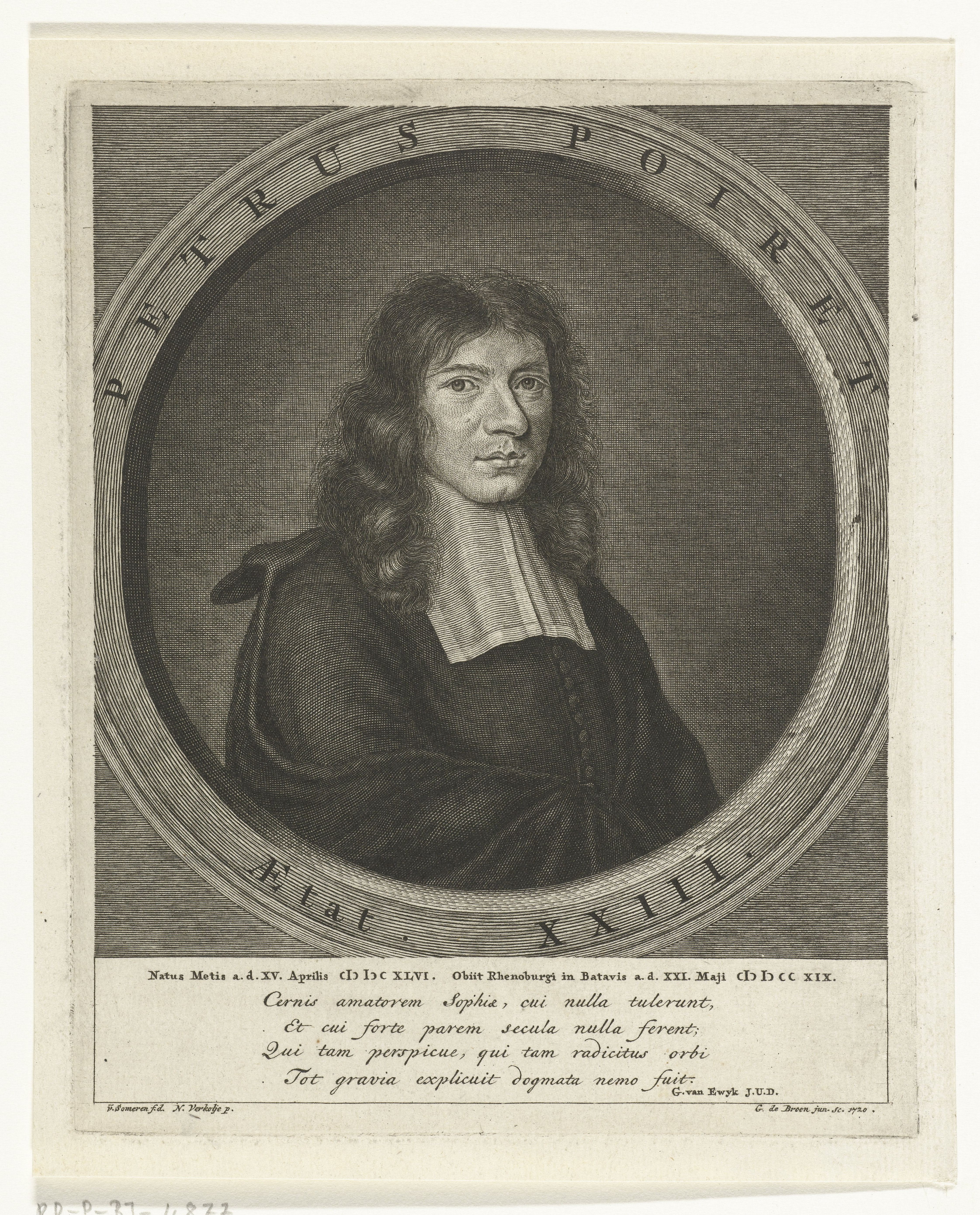 IdentificatieTitel(s): Portret van Pierre PoiretObjecttype: prent Objectnummer: RP-P-BI-4877Catalogusreferentie: Collectie Rijksmuseum-2(2)Opmerking: op basis van de aanwezige exemplaren in het RMAOpschriften / Merken: verzamelaarsmerk, verso, gestempeld: Lugt 240Omschrijving: Borstbeeld van de mysticus en schrijver Pierre Poiret in ovaal met randschrift. Onder het portret een Latijns vers over zijn leven door G. van Ewyk.VervaardigingVervaardiger: prentmaker: Gerrit de Broen (II) (vermeld op object)naar tekening van: van Someren (vermeld op object)naar schilderij van: Nicolaas Verkolje (vermeld op object)schrijver: G. van Ewyk (vermeld op object)Plaats vervaardiging: AmsterdamDatering: 1720Fysieke kenmerken: ets en gravureMateriaal: papier Techniek: etsen / graveren (drukprocedé)Afmetingen: plaatrand: h 173 mm × b 140 mmOnderwerpWie: Pierre PoiretVerwerving en rechtenVerwerving: overdracht van beheer 1816Copyright: Publiek domein